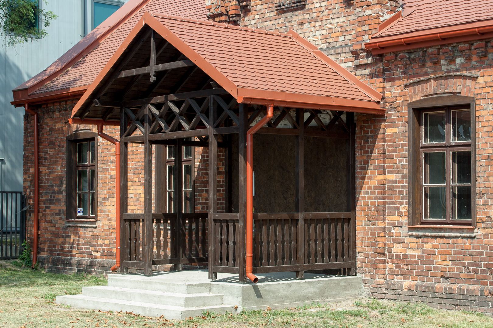 Murowanka czyli dawna szkoła w Wawrze po remoncie - odtworzony ganek. ul. Płowiecka 77, Warszawa